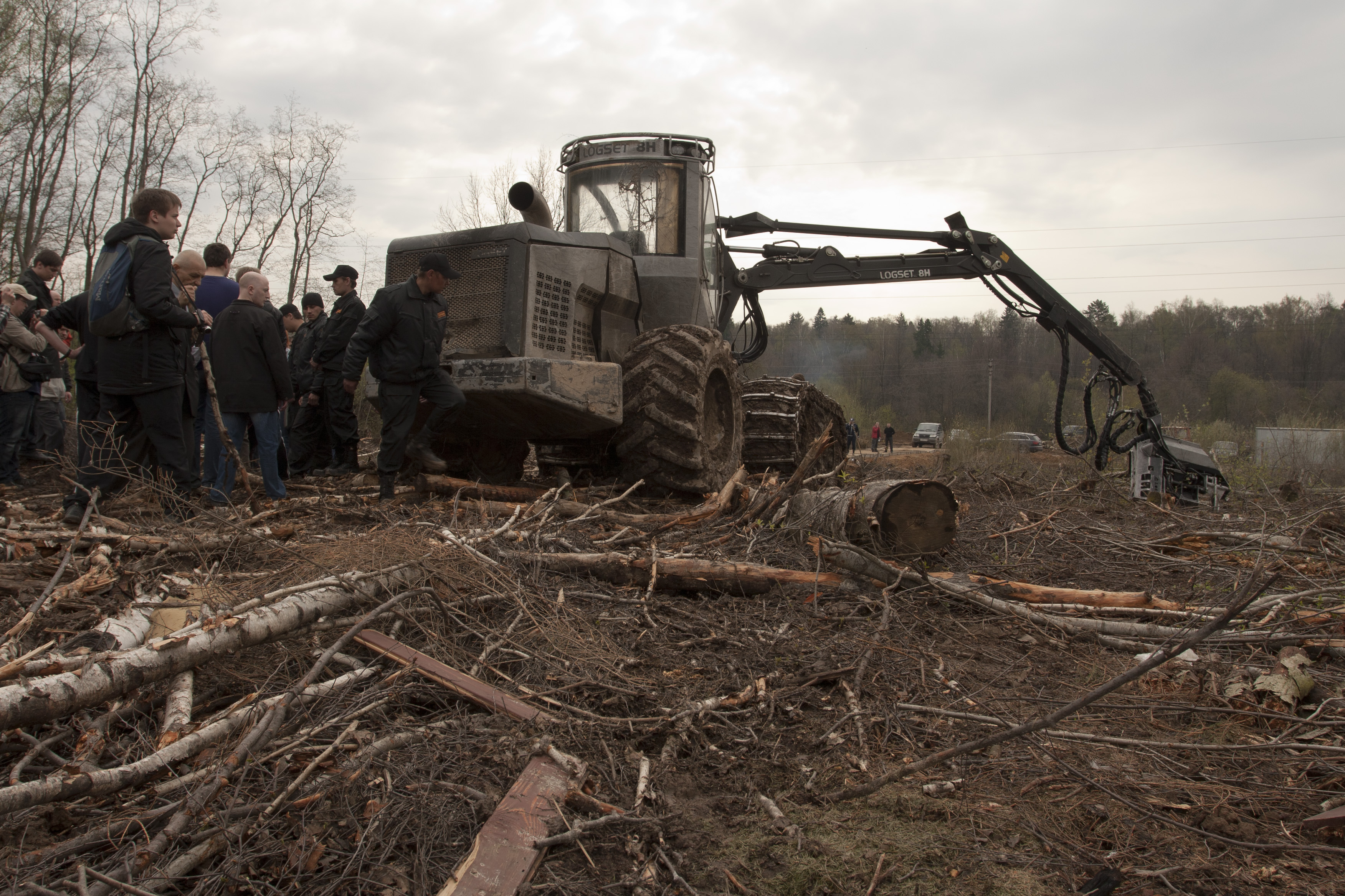 In Khimki Forest